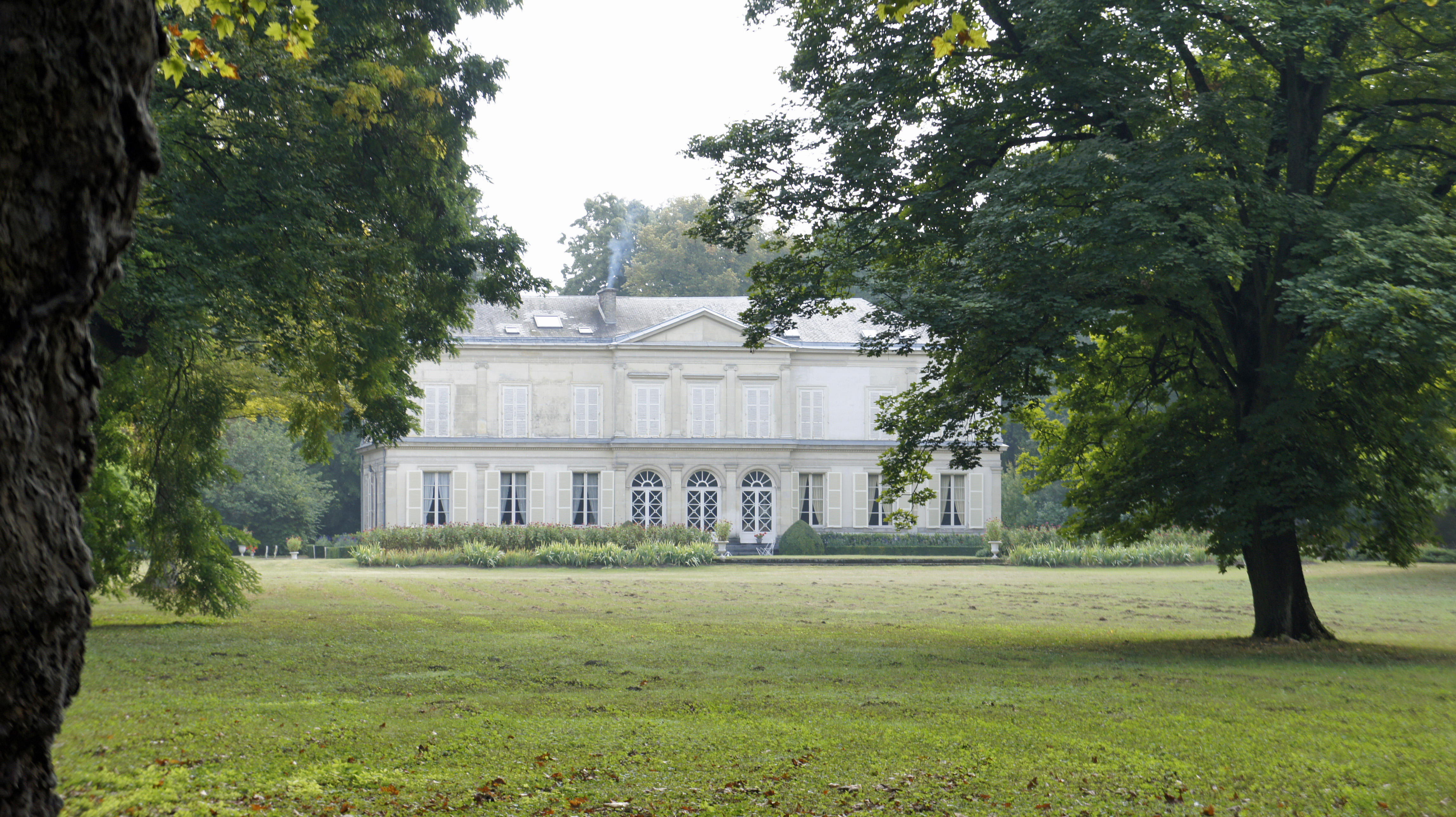 Vue de la façade du château depuis le parc.